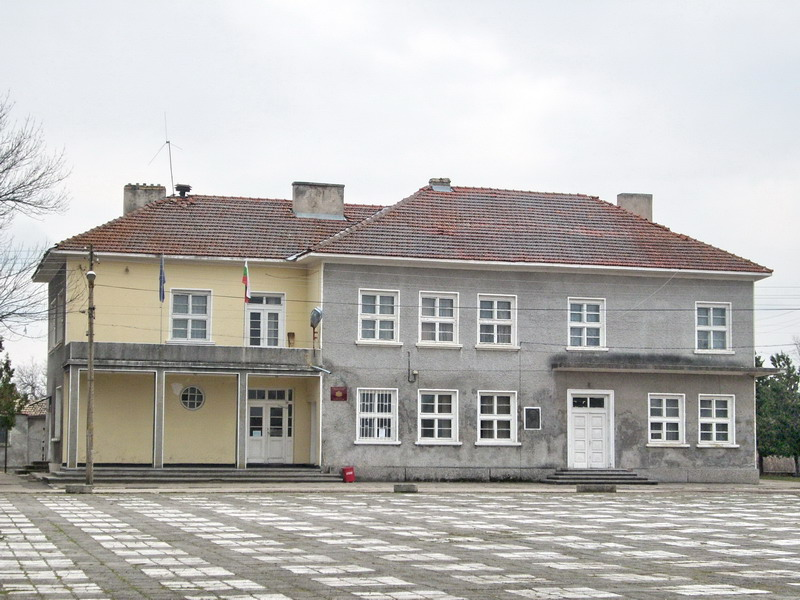 Село Кардам, община Попово. Кметството и Народното читалище